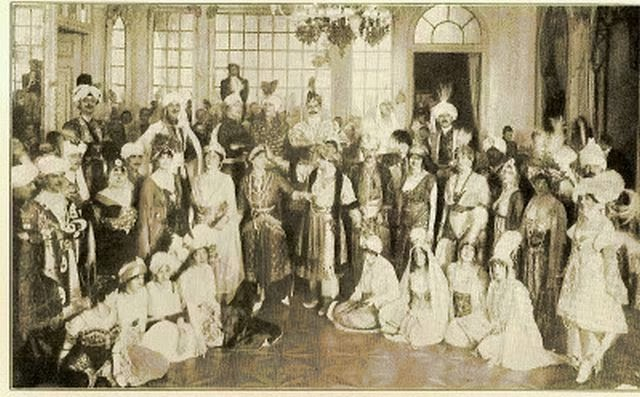 Участники бала графини М. Э. Клейнмихель в маскарадных костюмах